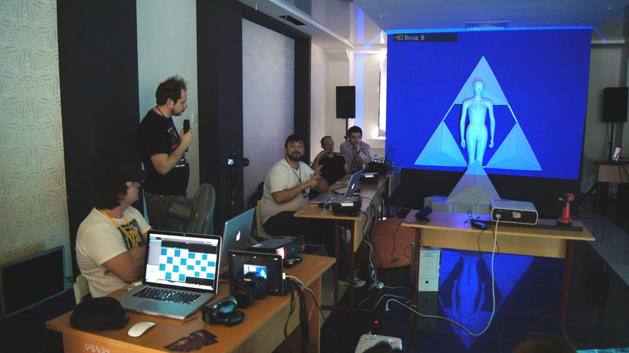 Работа VJ секции на Мультиматографе